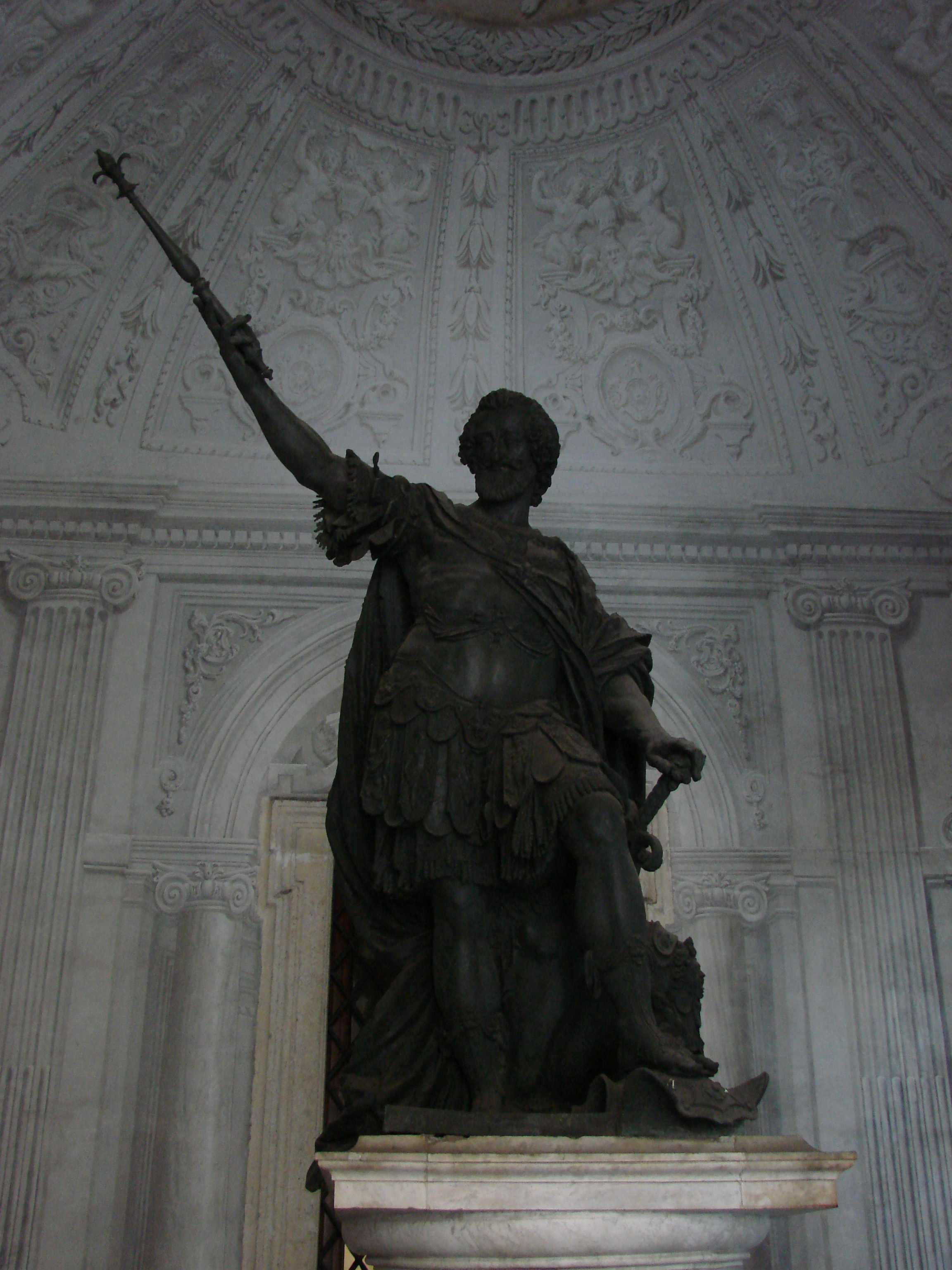 Statue du roi Henri IV par Nicolas Cordier (1608), basilique Saint-Jean-de-Latran. Photographie d 'Allie Caulfield.